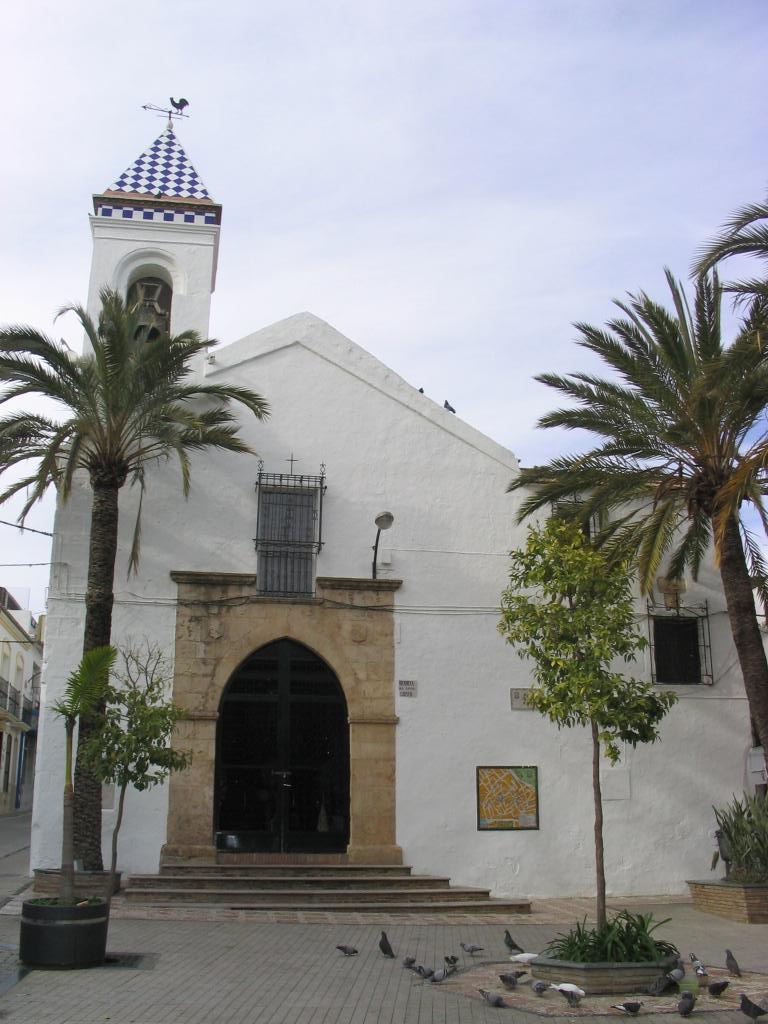 Ermita del Santo Cristo de la Vera Cruz, Marbella, España